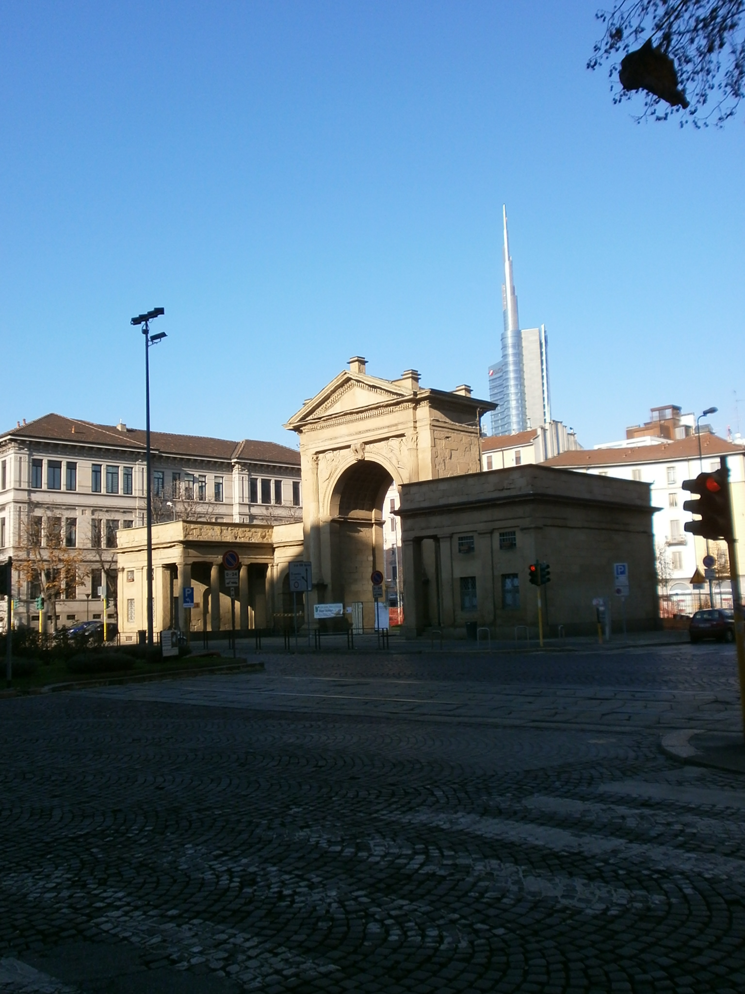 Porta nuova - Milano